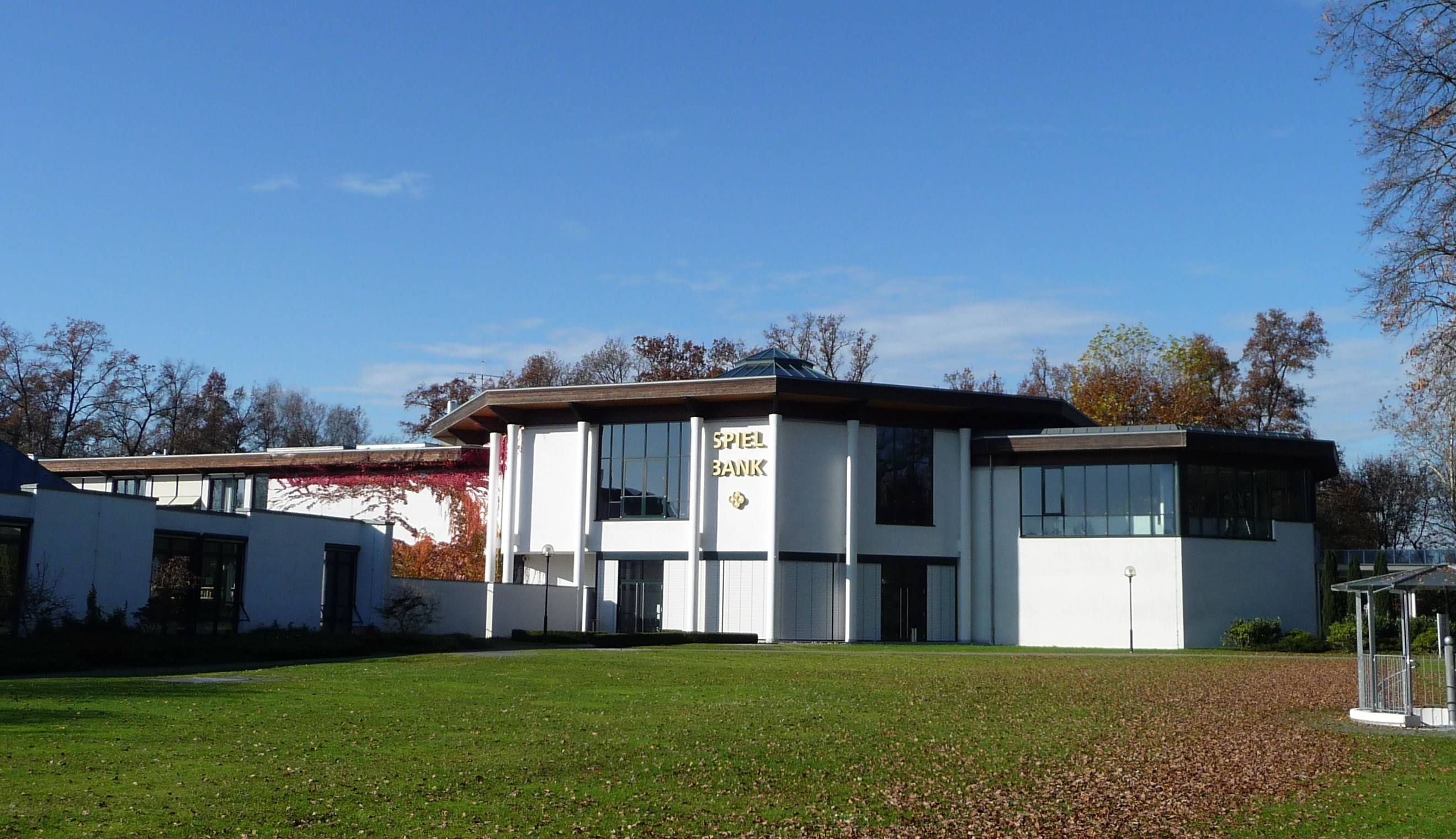 Die Bayerische Spielbank Bad Füssing